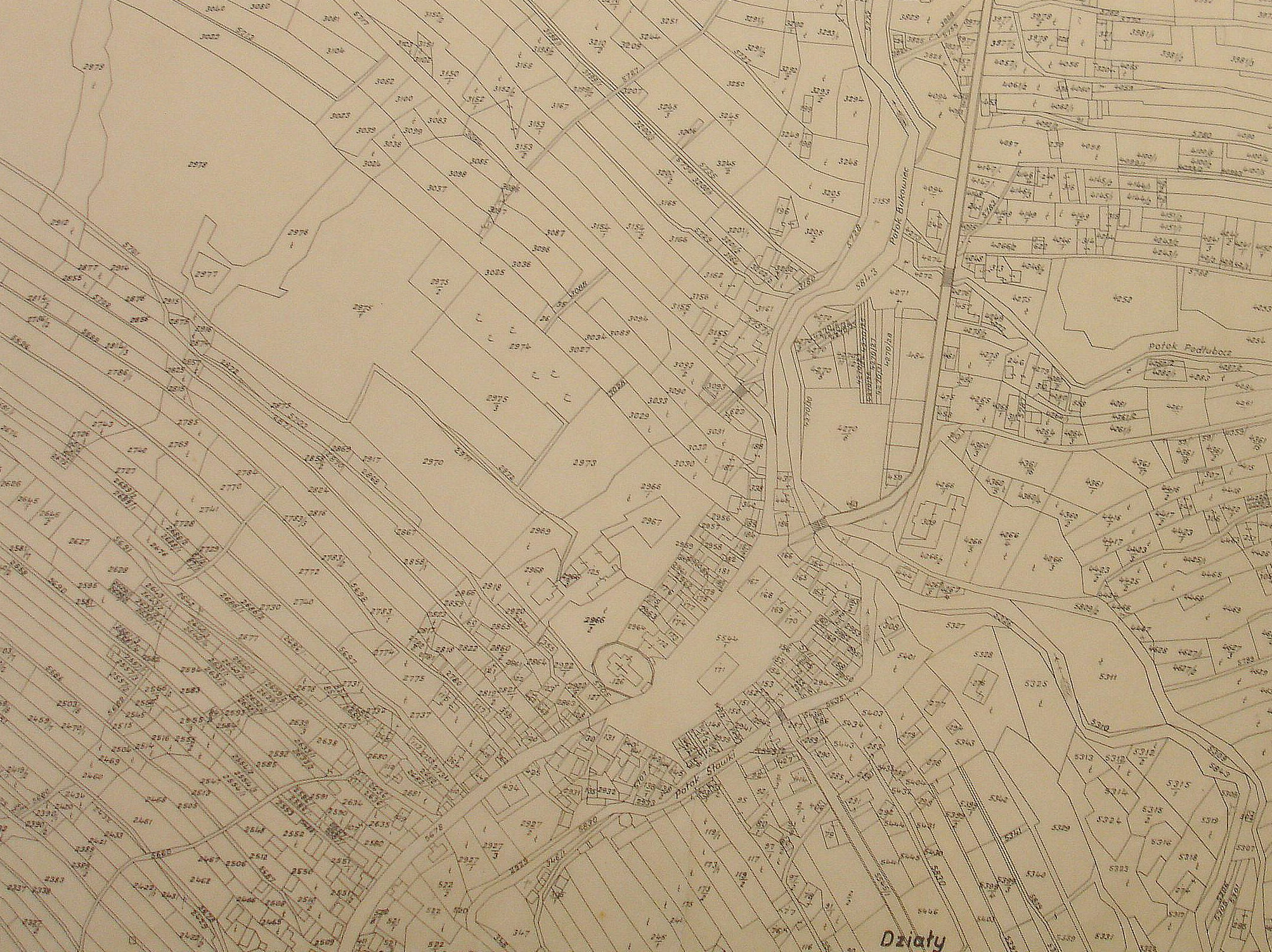 mapa katastralna Bukowska, rok 1906 Galicja